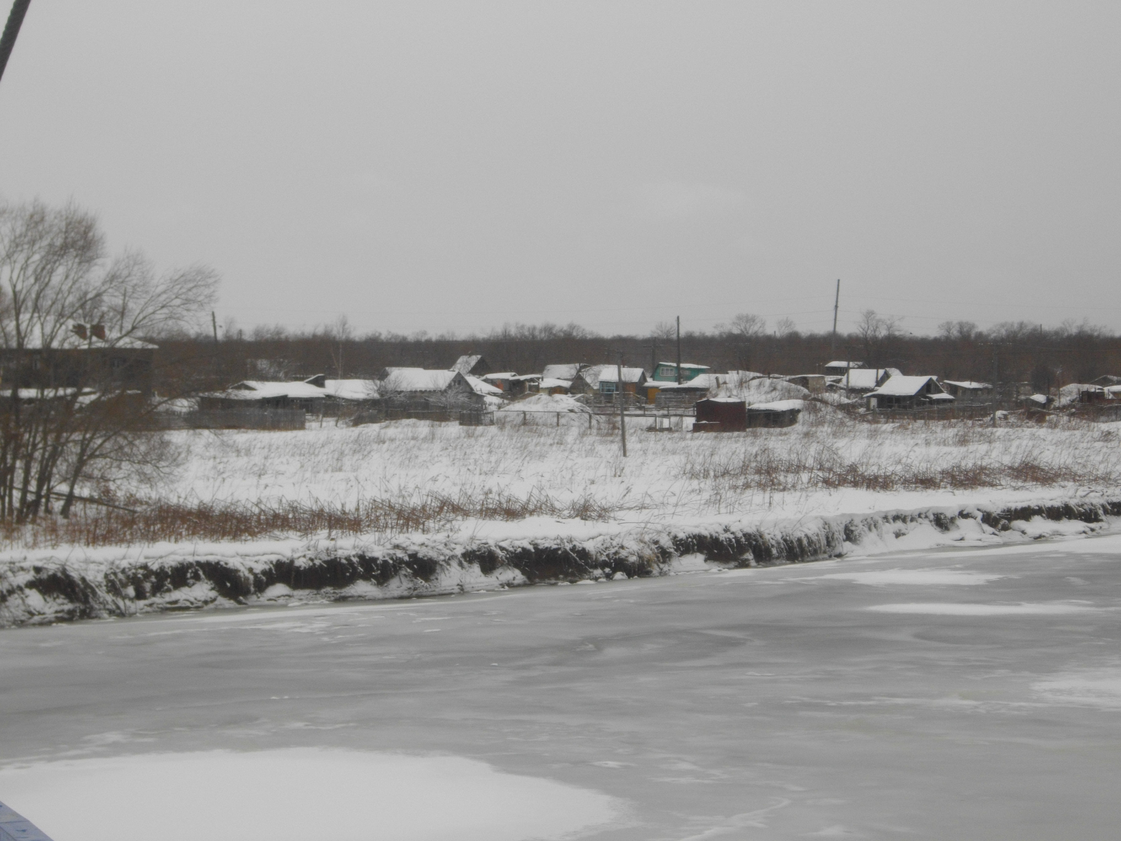 Река Лютога в Аниве